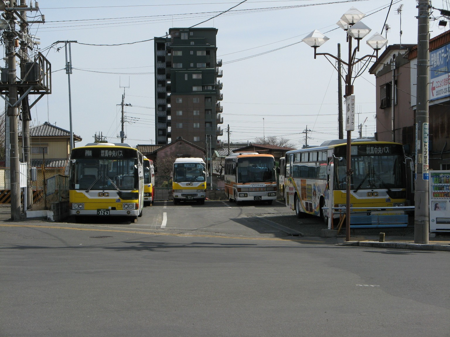 群馬中央バス伊勢崎営業所車庫の画像。伊勢崎駅前の公道上で撮影。